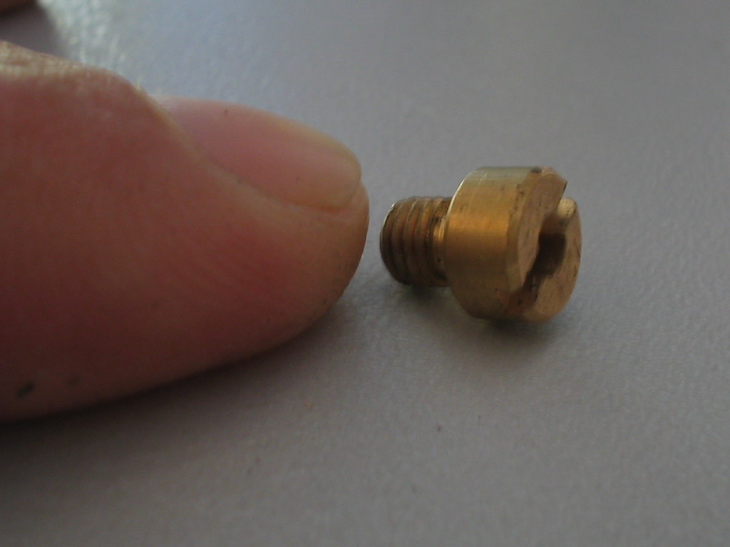 Sproeier en vinger ter verhouding Categorie:Wikipedia:Afbeeldingen/Gebruiker:Michiel1972